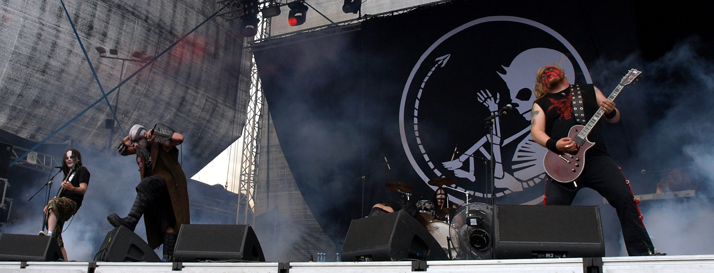 Turmion Kätilöt live am Myötätuulirock 2011